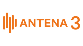 Antena 3